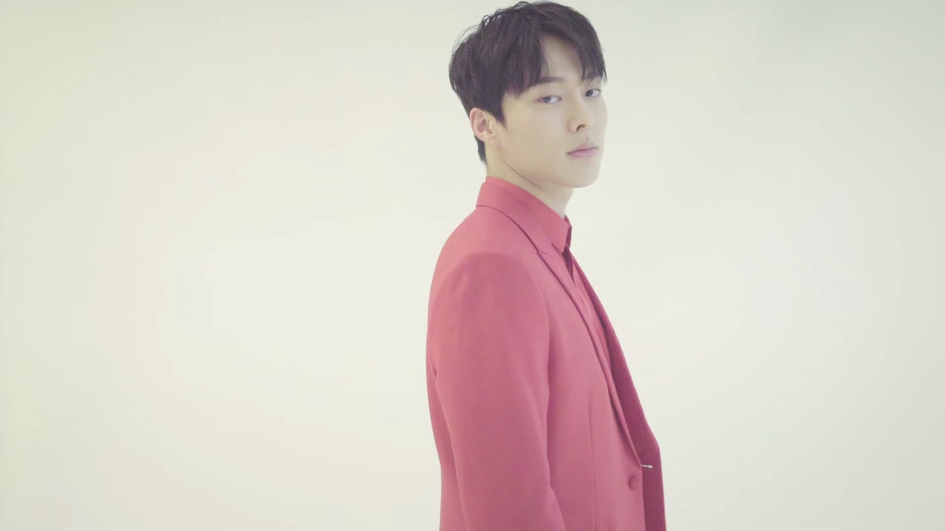 장기용의 정공법